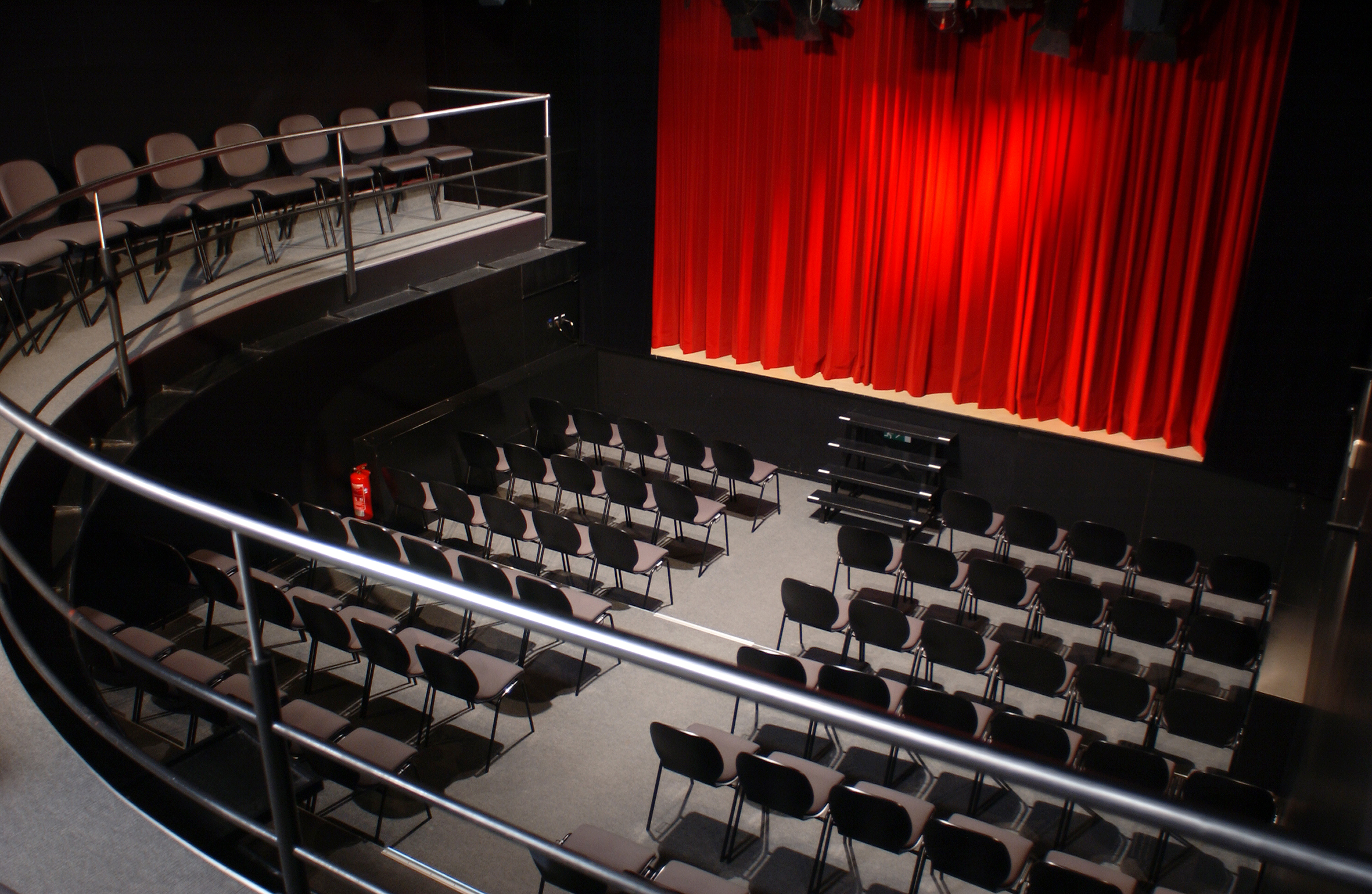 Innenraum des Dresdner Theaterkahns, Blick vom Rang auf die Bühne